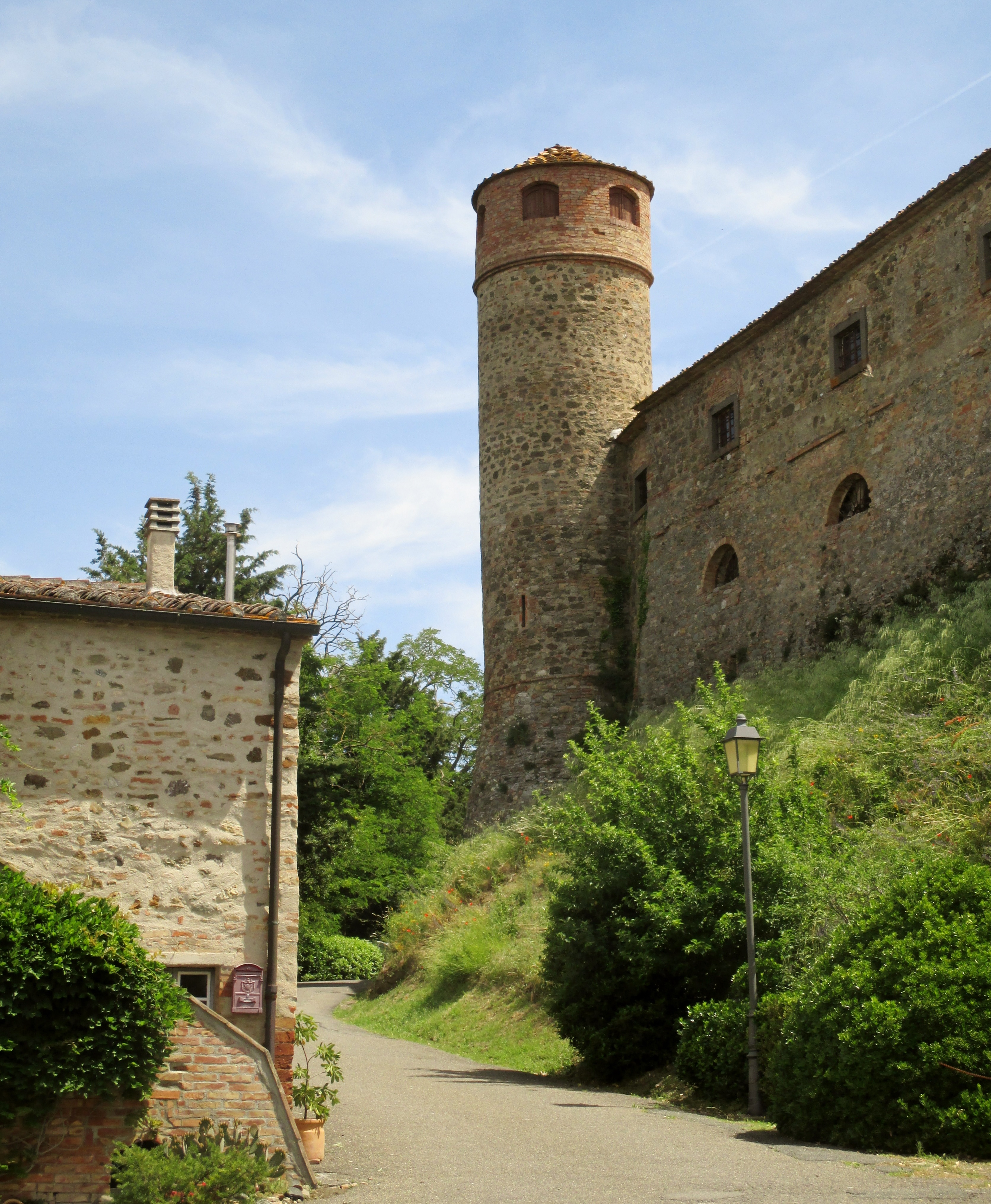 Montegemoli (Pomarance), veduta della torre rotonda